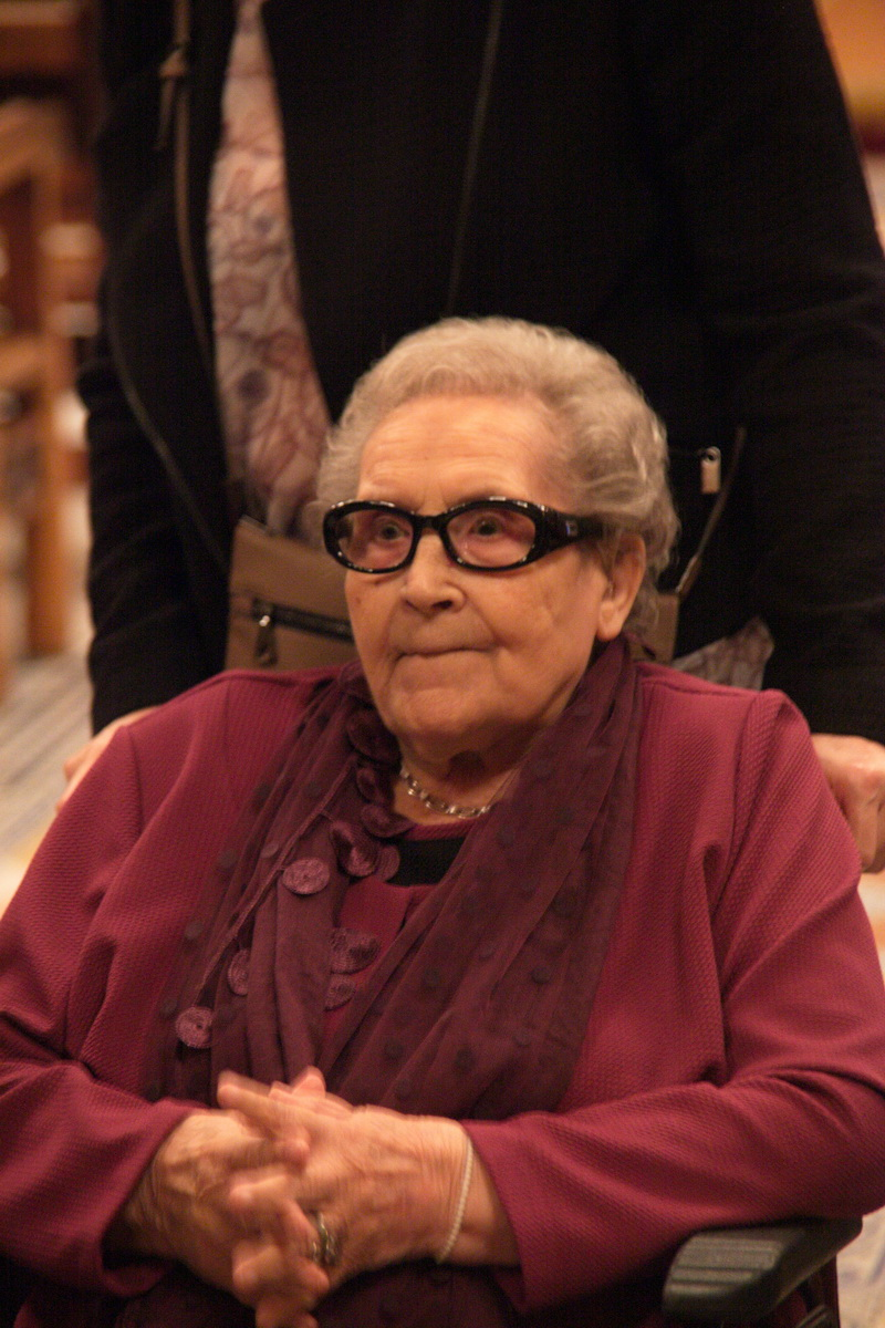 Acte de lliurament a Neus Català de la medalla d'Or al Mèrit Cívic de l'Ajuntament de Barcelona. 29-10-2014